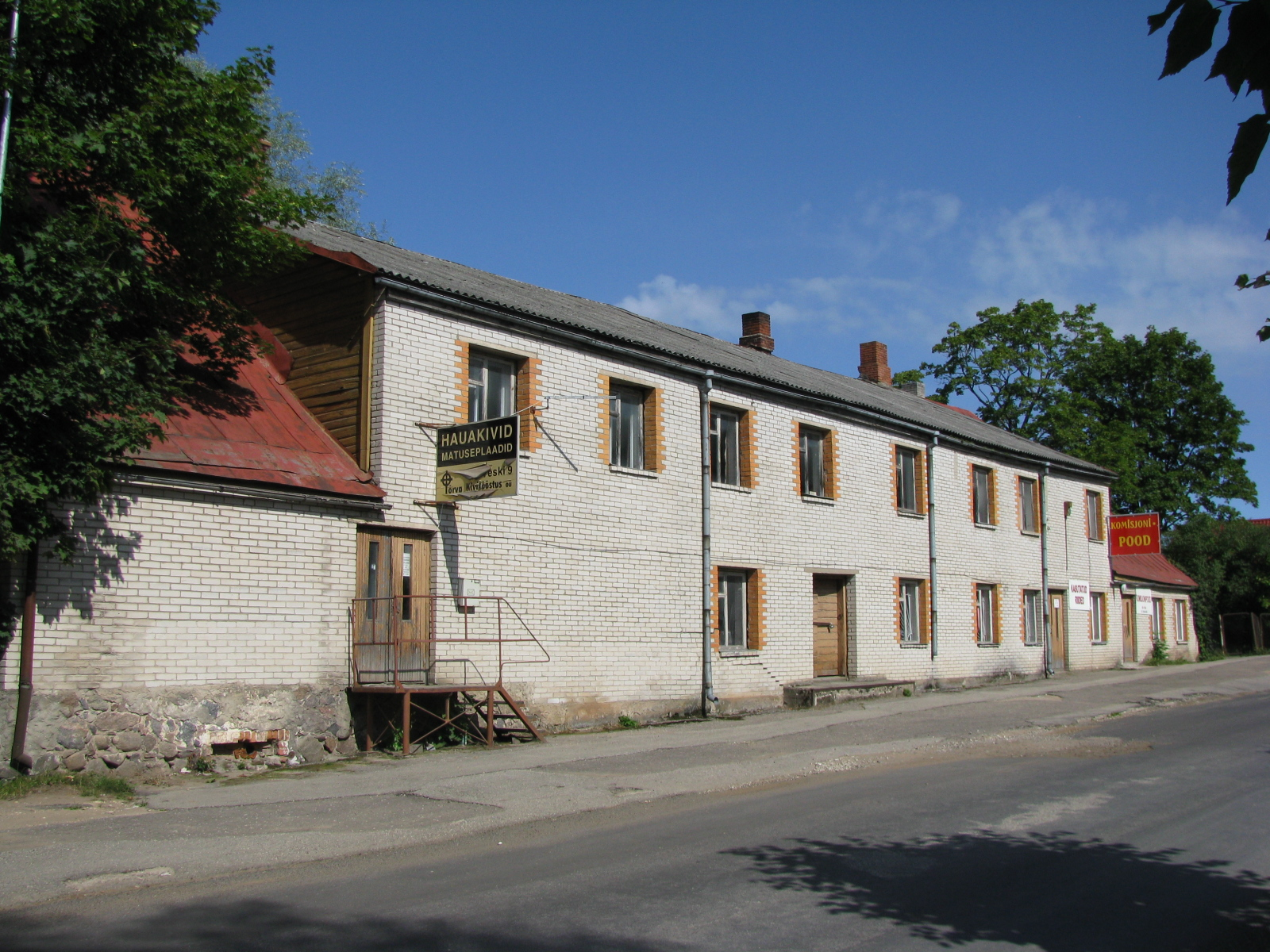 Veski tn 9